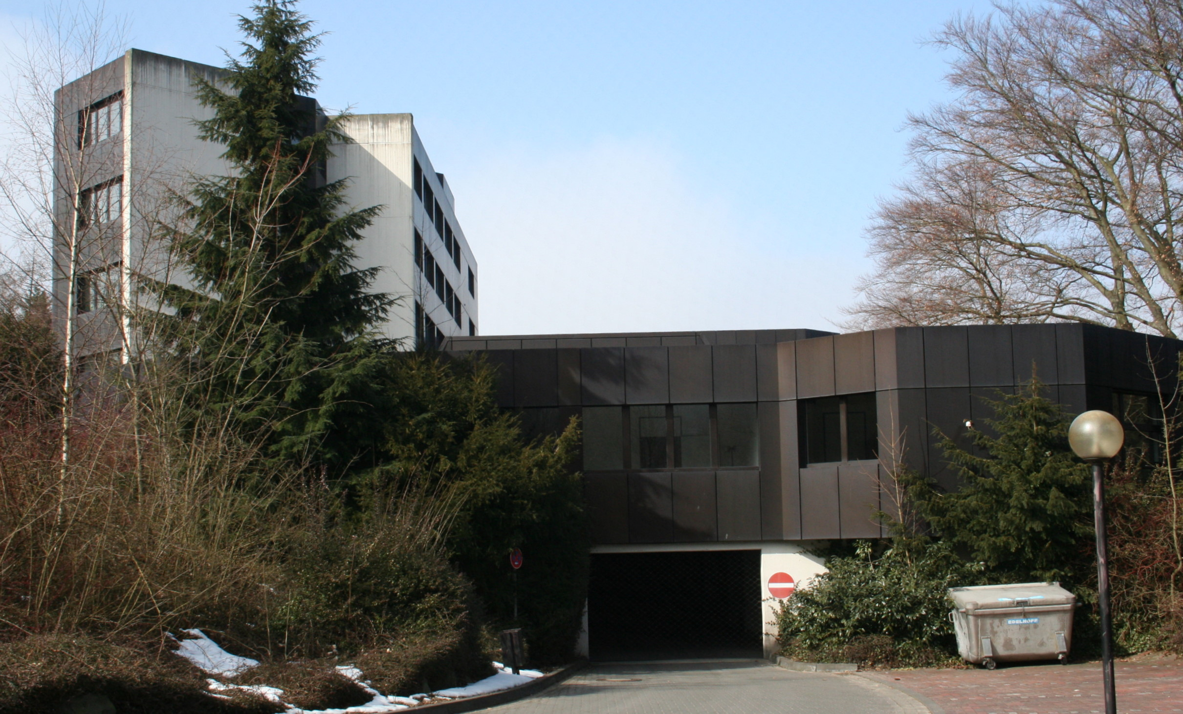 Description: Rückansicht Amtsgericht Iserlohn, Friedrichstraße 108/110 in Iserlohn Source: selbst fotografiert Date: 19. März 2006 Author: Bubo